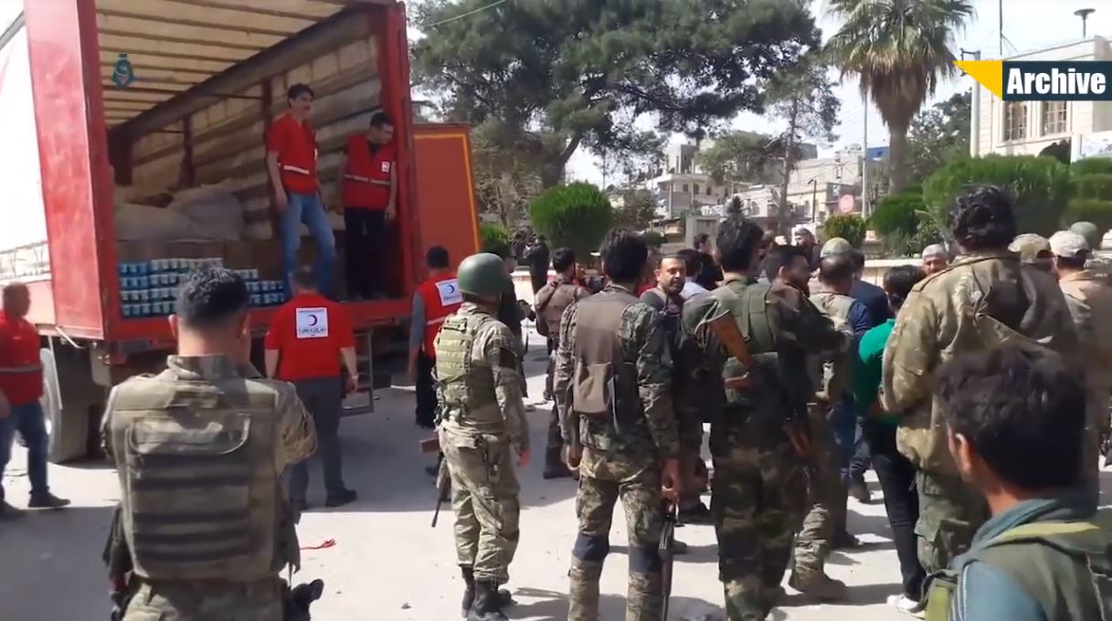 Prise d'Afrine par l'armée turque et l'Armée syrienne libre le 18 mars 2018.